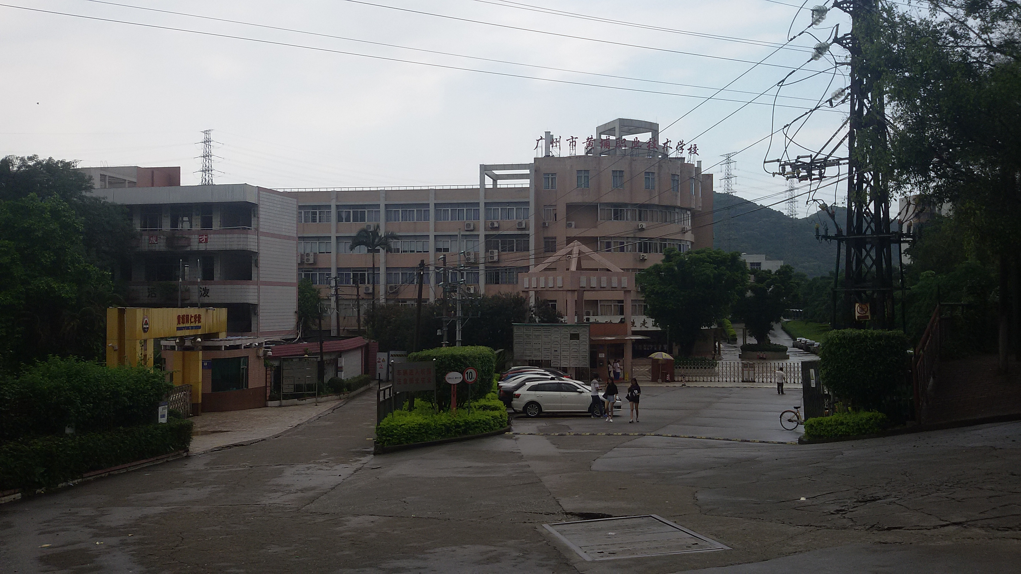 粵語: 廣州市黃埔職業技術學校嘅学校正门